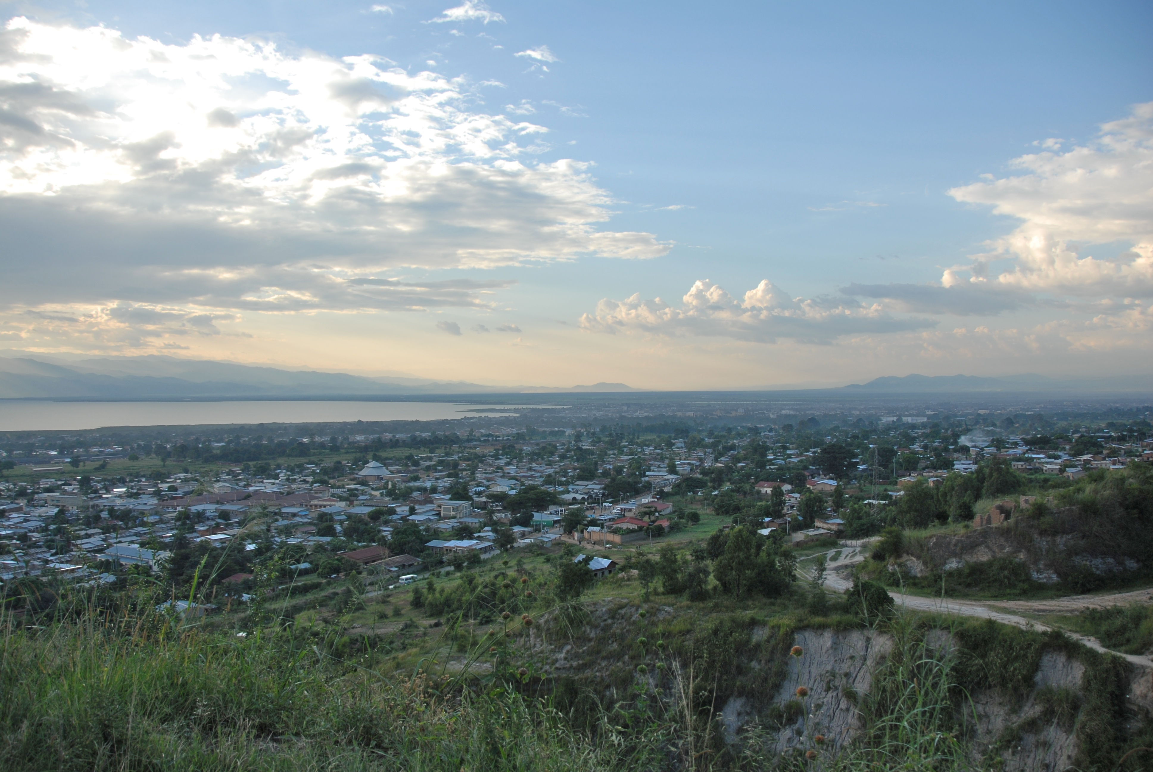 Bujumbura